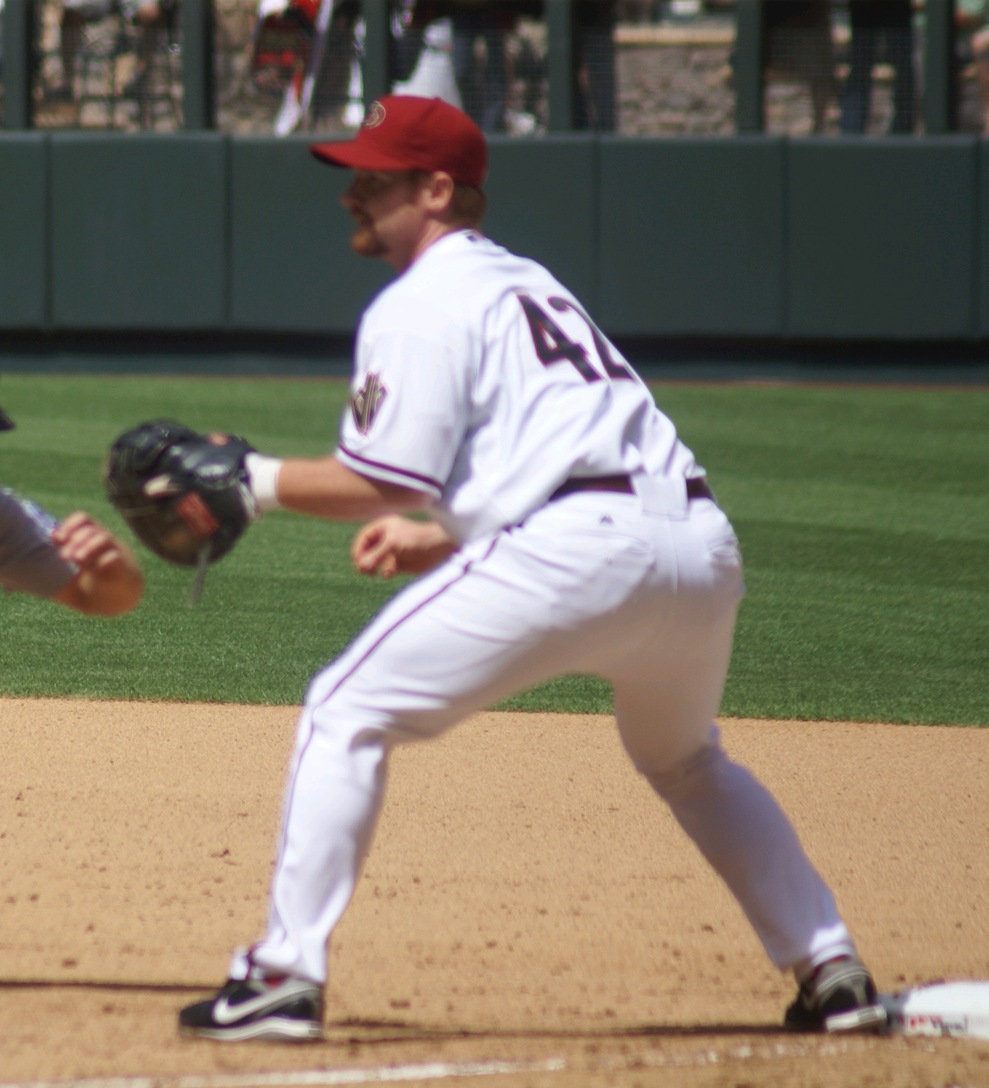 Chad Tracy